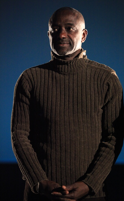 Mansour Sora Wade présent au Festival international du film d'amour de Mons (Belgique).